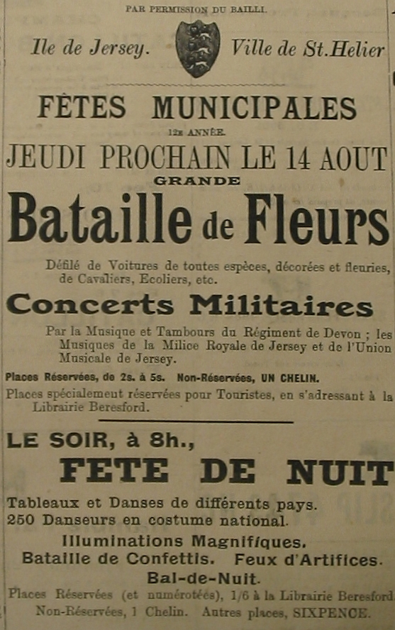 Nrf: D'la Vielle Chronique, Jèrri